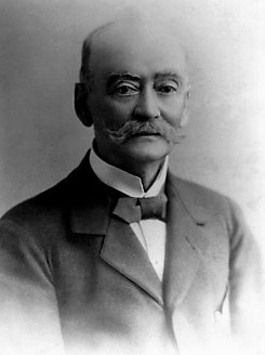 Rafael Antonio Casanova Casanova, abogado y político liberal chileno. Nació en Santiago, el 21 de octubre de 1828. Falleció el 18 de agosto de 1903. Hijo de Juan Ramón Casanova y de Isabel Casanova. Estudió Derecho en la Universidad de Chile; juró como abogado el 2 de septiembre de 1853. Adherido al Partido Liberal y posteriormente al Partido Liberal Democrático.